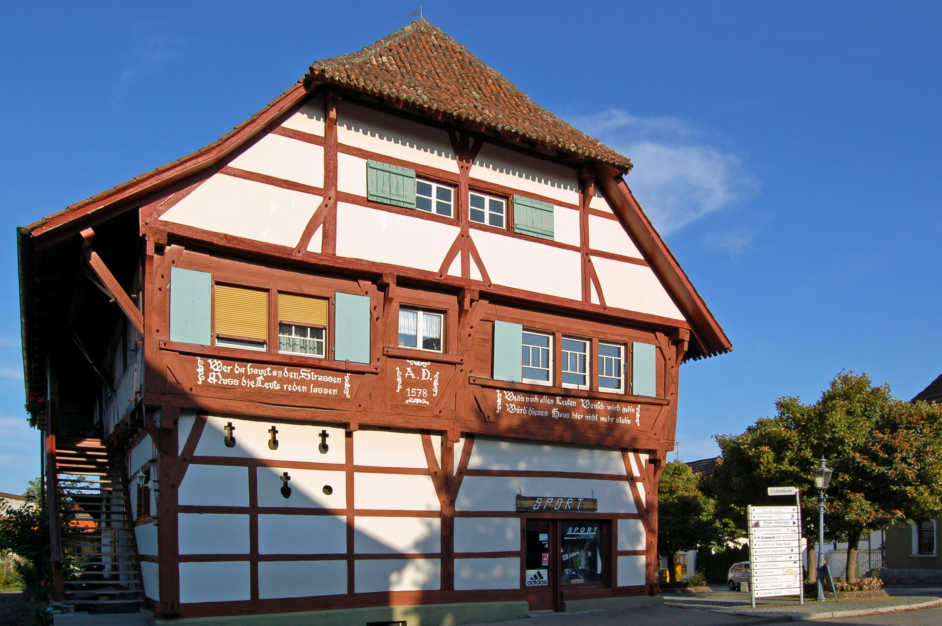 Das schönste, vor einiger Zeit renovierte, Fachwerkhaus in Immenstaad mit seinen Inschriften an der Stirnfront ist die ehemalige Pulvermühle im Ortskern nahe der St.-Jodokus-Kirche (erbaut 1578).